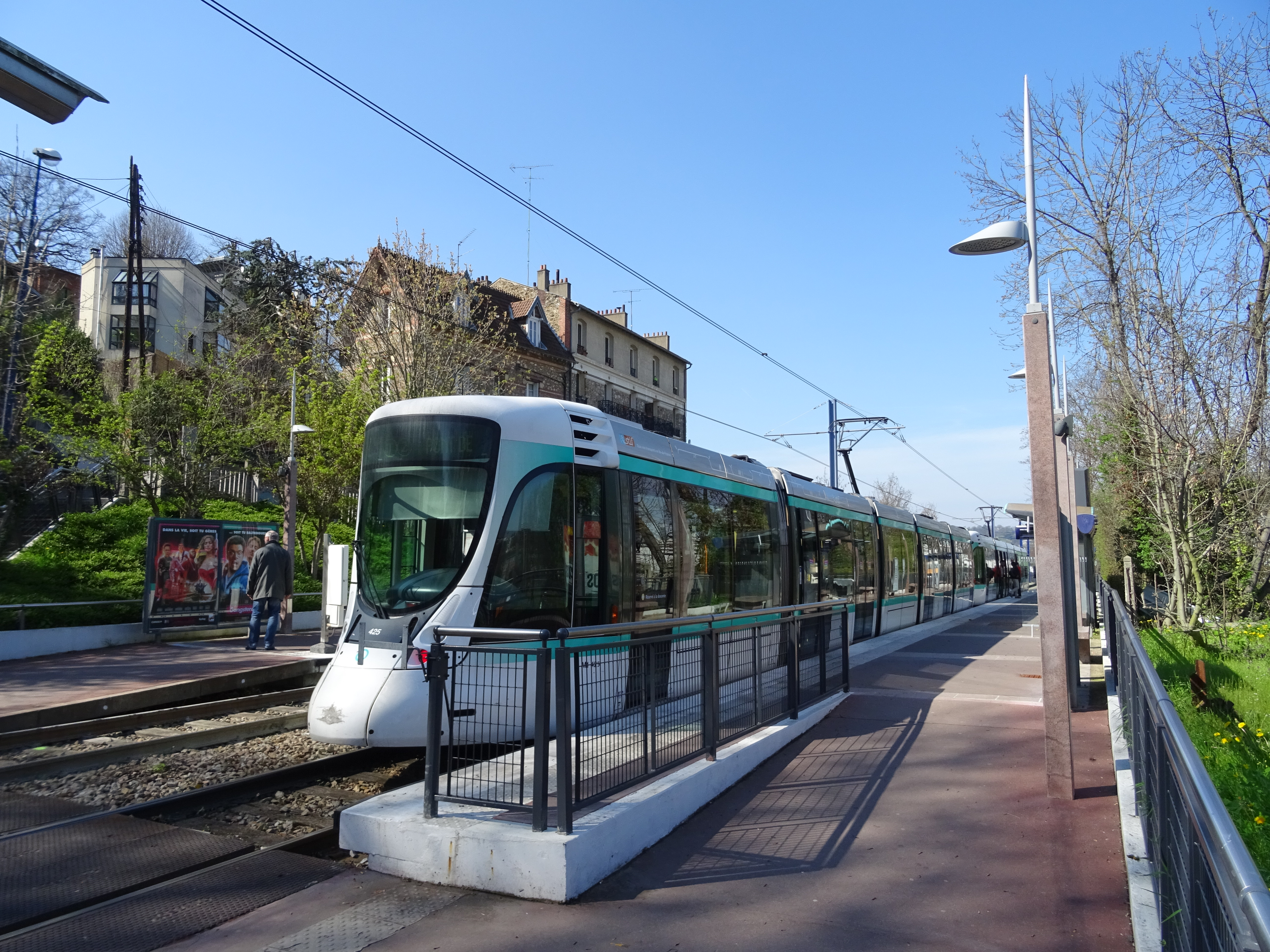 Citadis 302 à quai à la station Brimborion